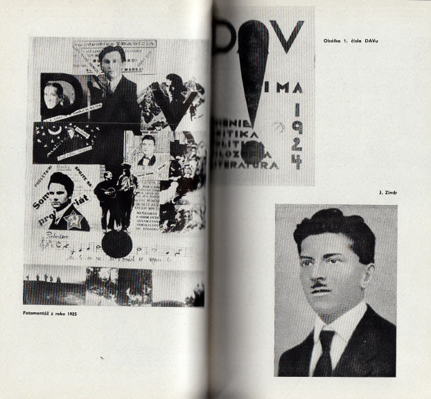 Revue DAV